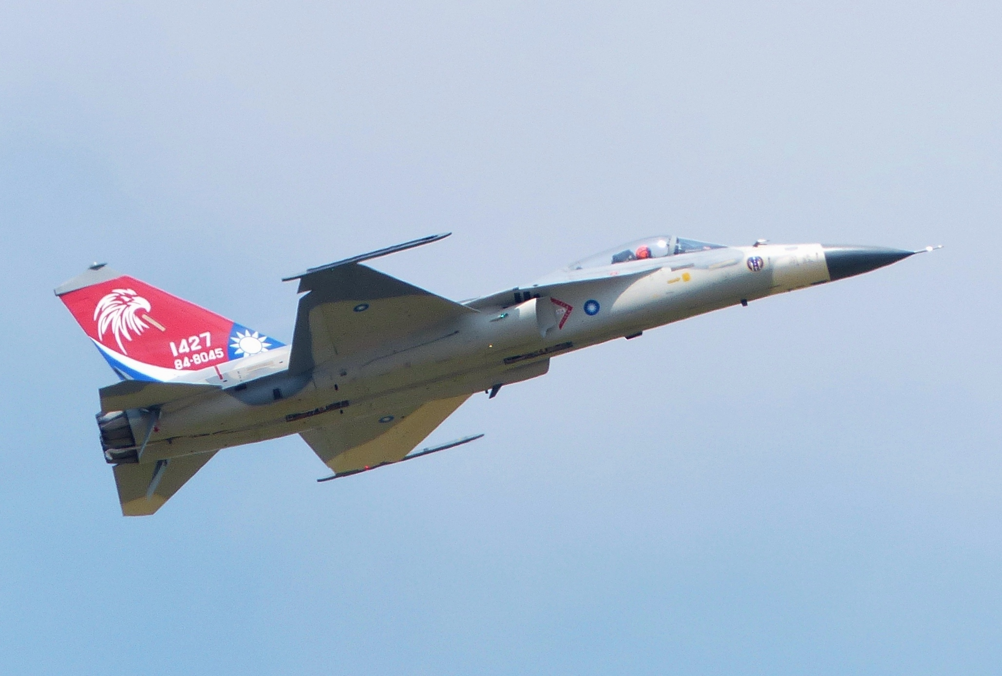 2014年空軍清泉崗基地營區開放活動，經國號F-CK-1A 1427戰技操演。